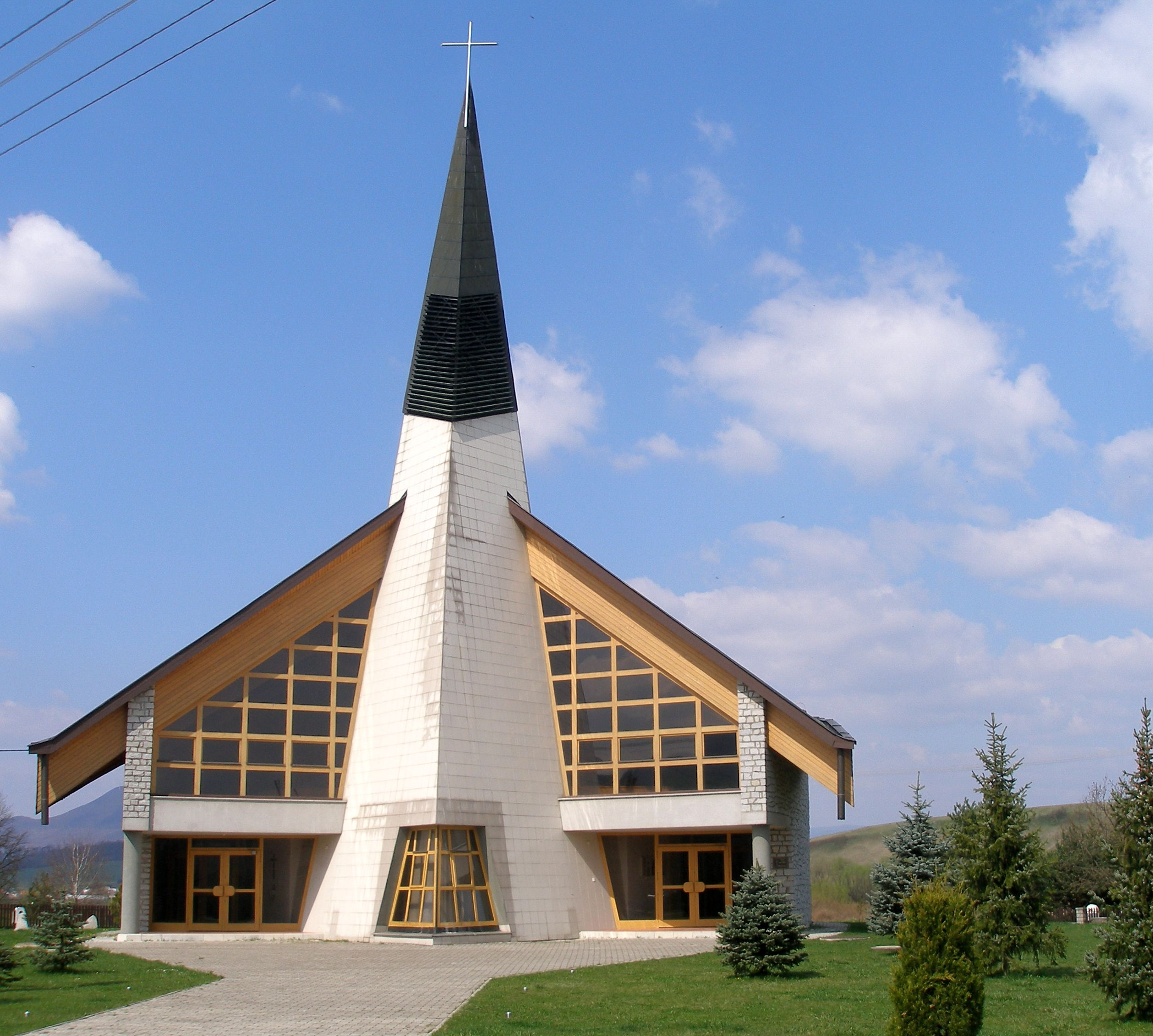 Obec Lada okres Prešov, región Šariš